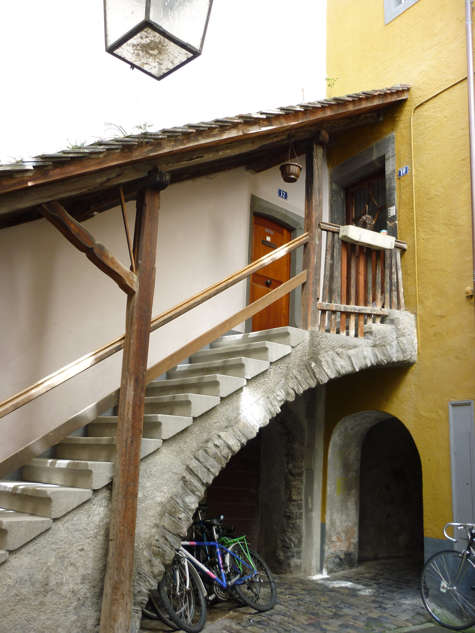 Bärenloch, Chur GR, Schweiz